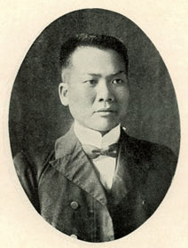 Bân-lâm-gú: Koeh Hôa-jiōng 郭華讓